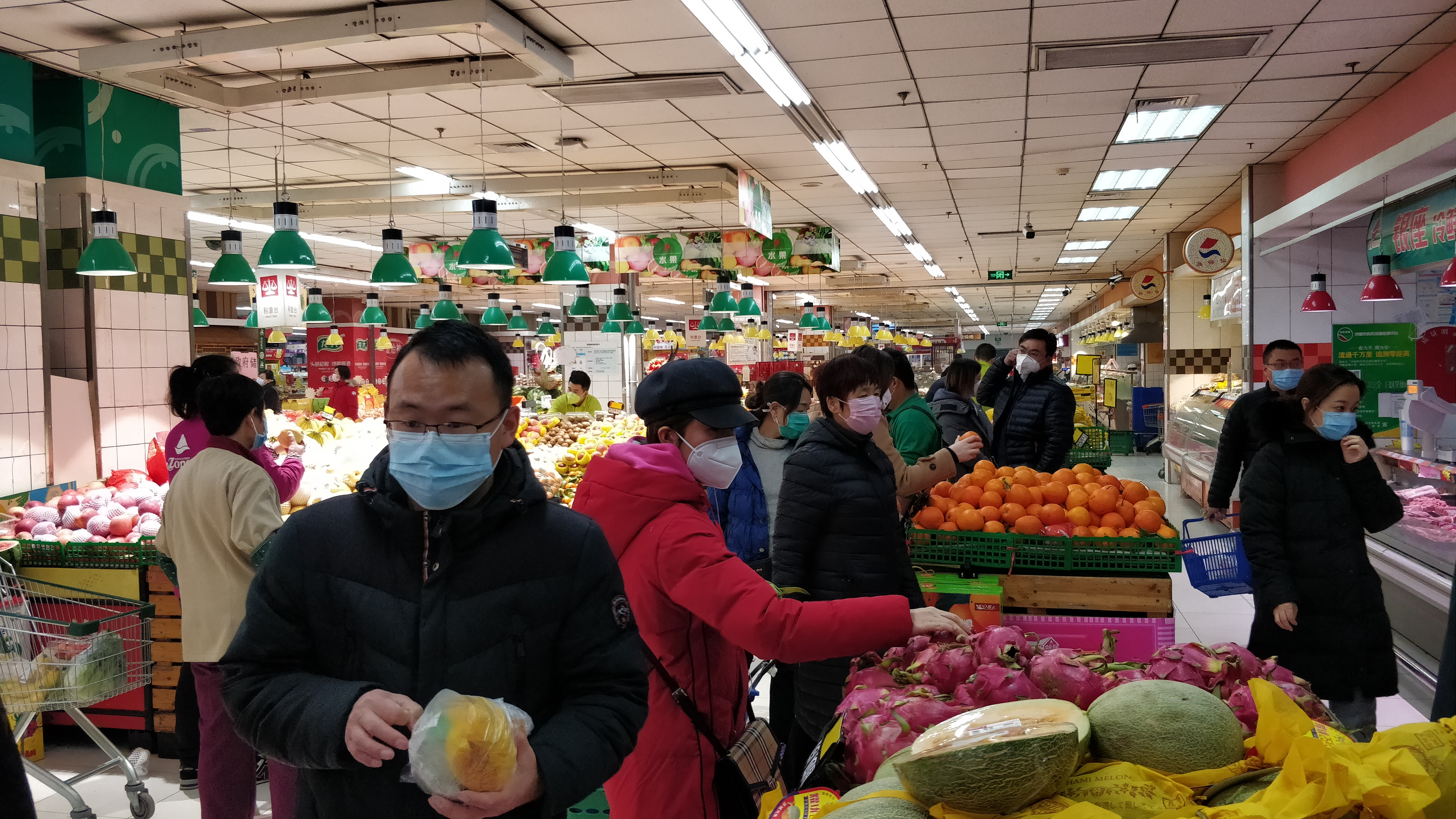 中文（中国大陆）: 摄于济南市燕山银座，顾客全部戴着口罩。2月4日在燕山银座发现有确诊新型冠状病毒感染的肺炎患者。